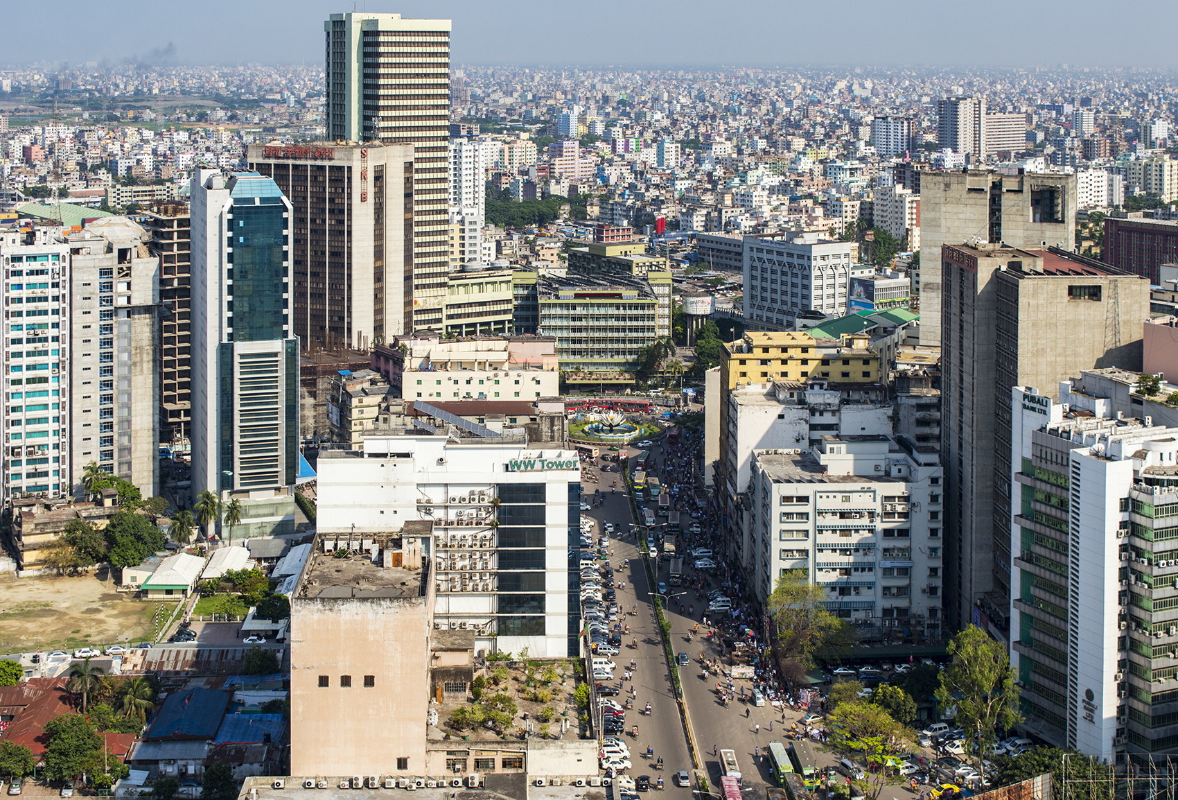 Dhaka